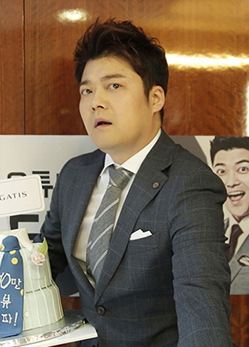 전현무 로가디스 스마트 슈트 영상 10만뷰 돌파, 4월 공중파 On-Air 확정!